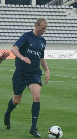 David Pollet, joueur de football Belge pour le RC Lens